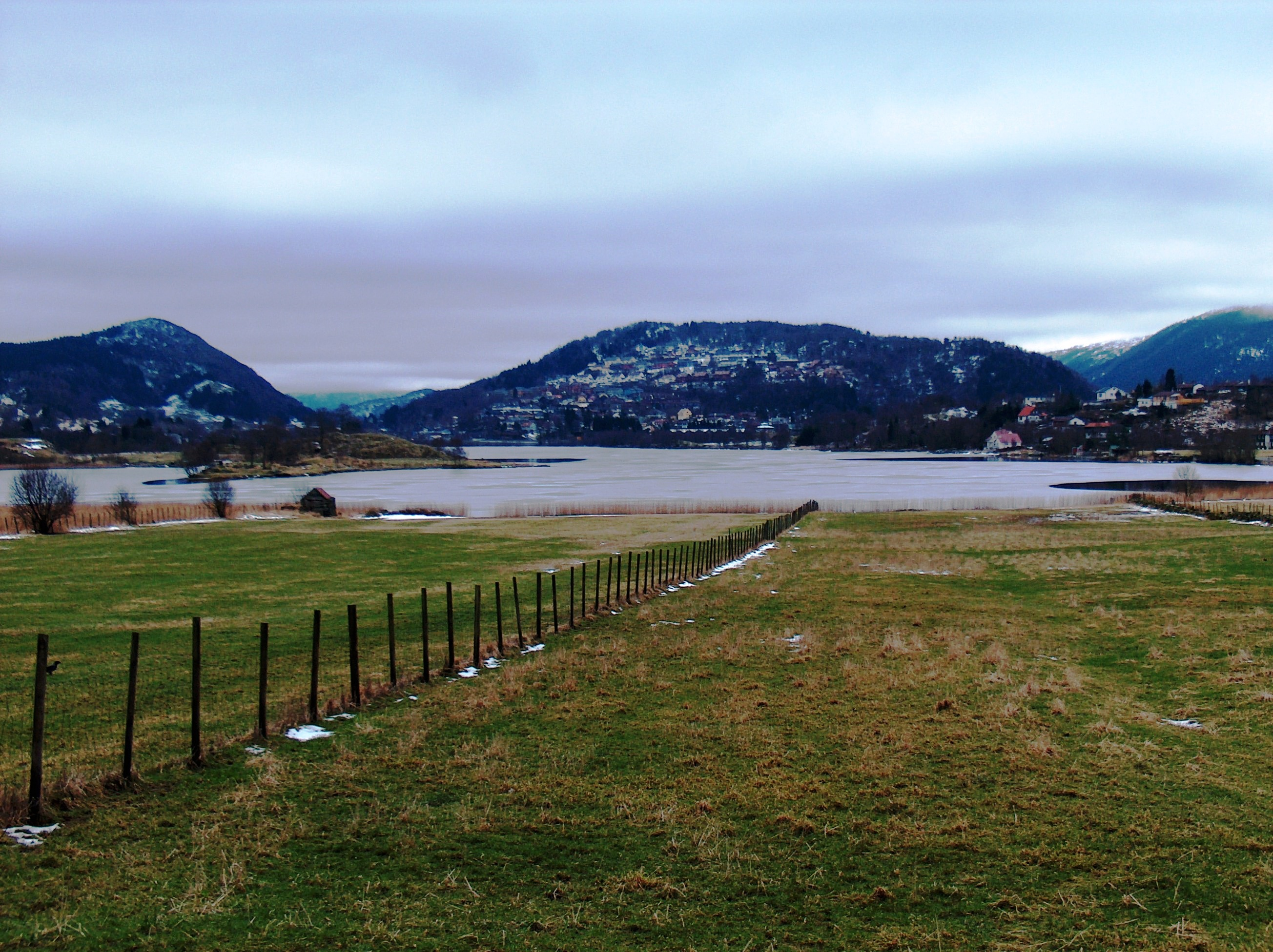 Langavatnet Åsane